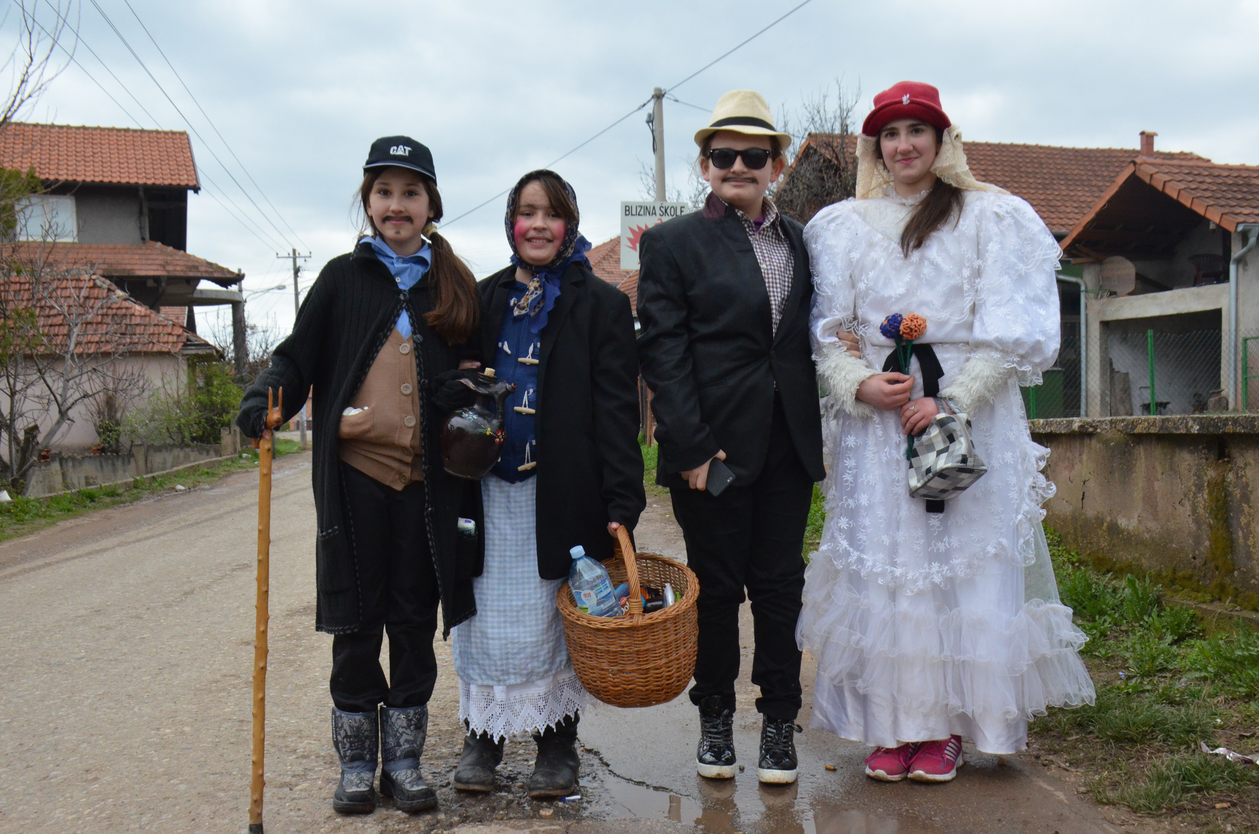 Сватови с младом - "комендије"